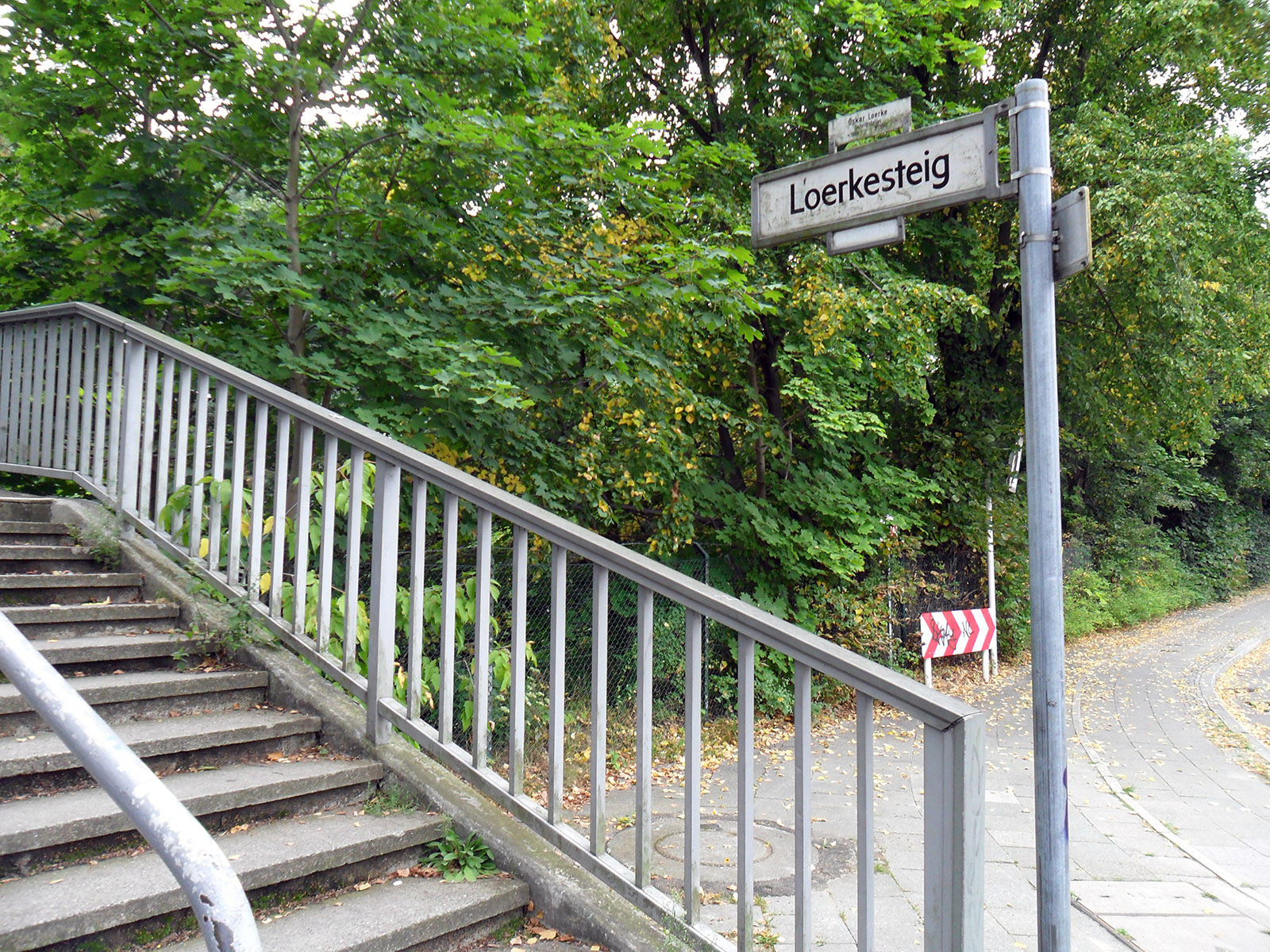 Östlicher Aufgang zur Fußgängerbrücke Loerkesteig in Berlin-Hermsdorf, benannt nach Oskar Loerke (1884-1941).